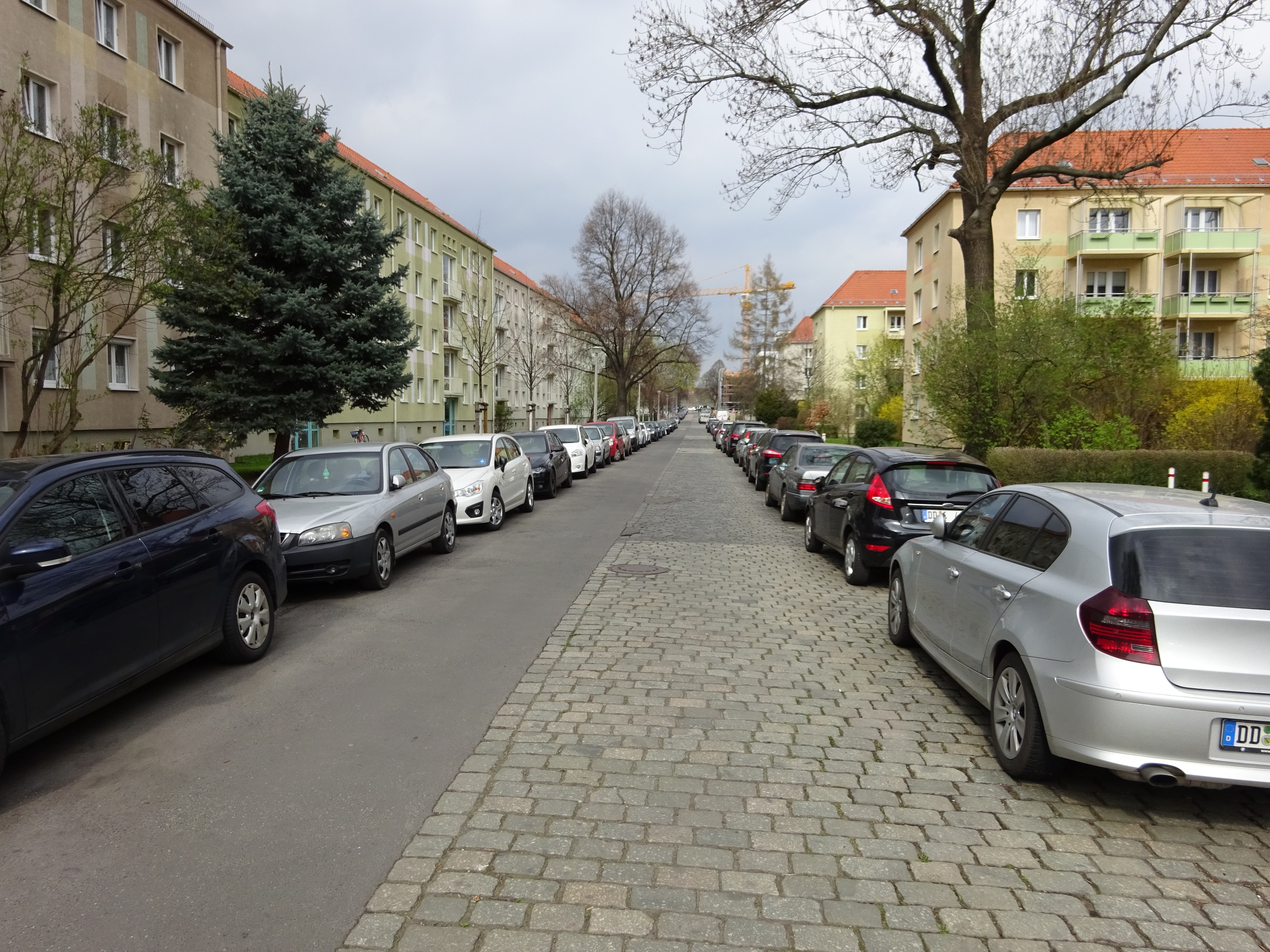 Bergstraße in Dresden, Blickrichtung Hauptbahnhof